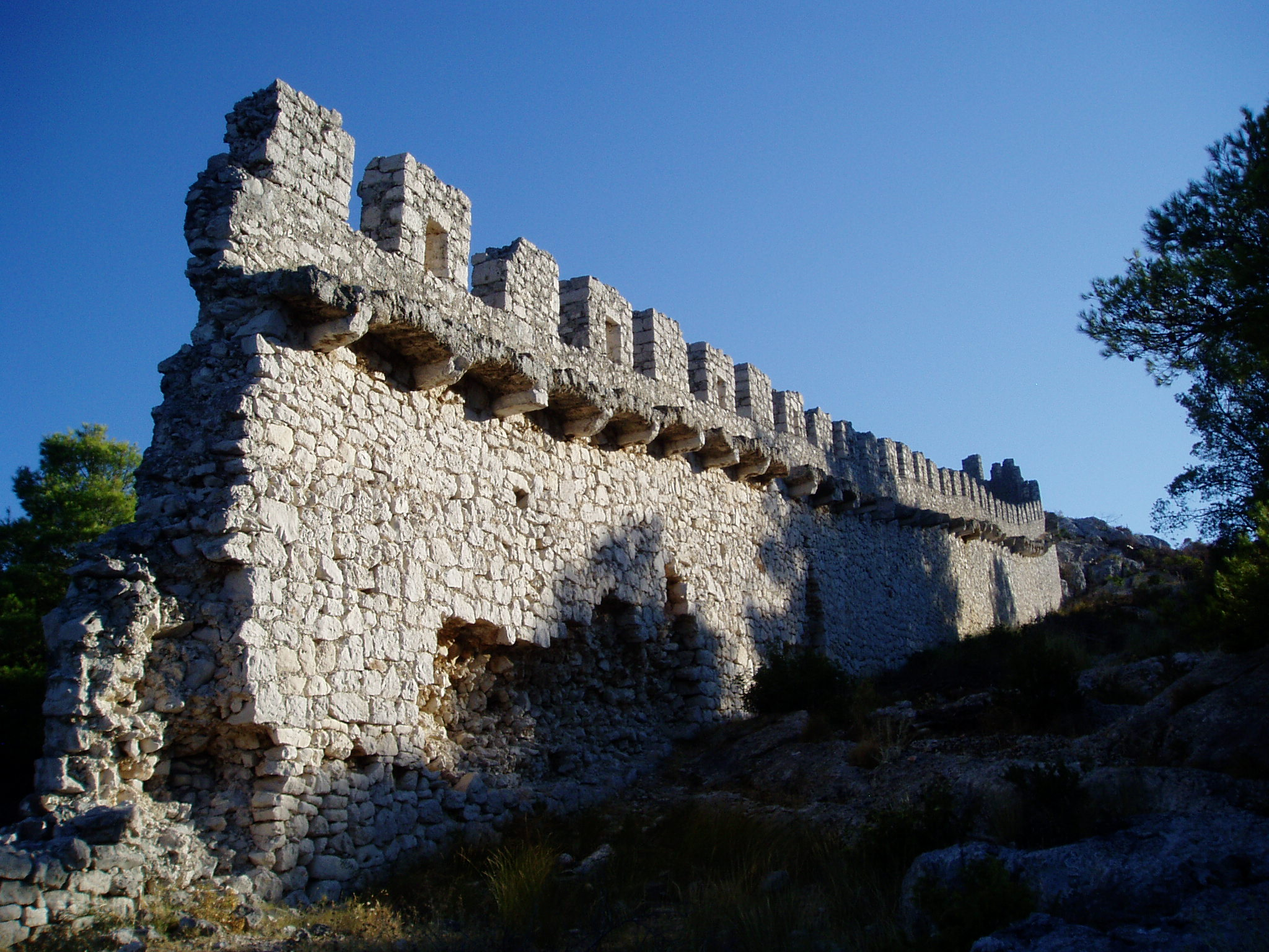 Obrambeni zid i ruševine crkve sv. Duha